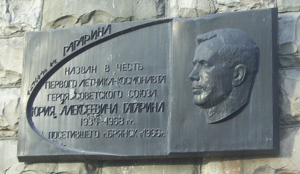 Мемориальная доска на бульваре Гагарина (Брянск).